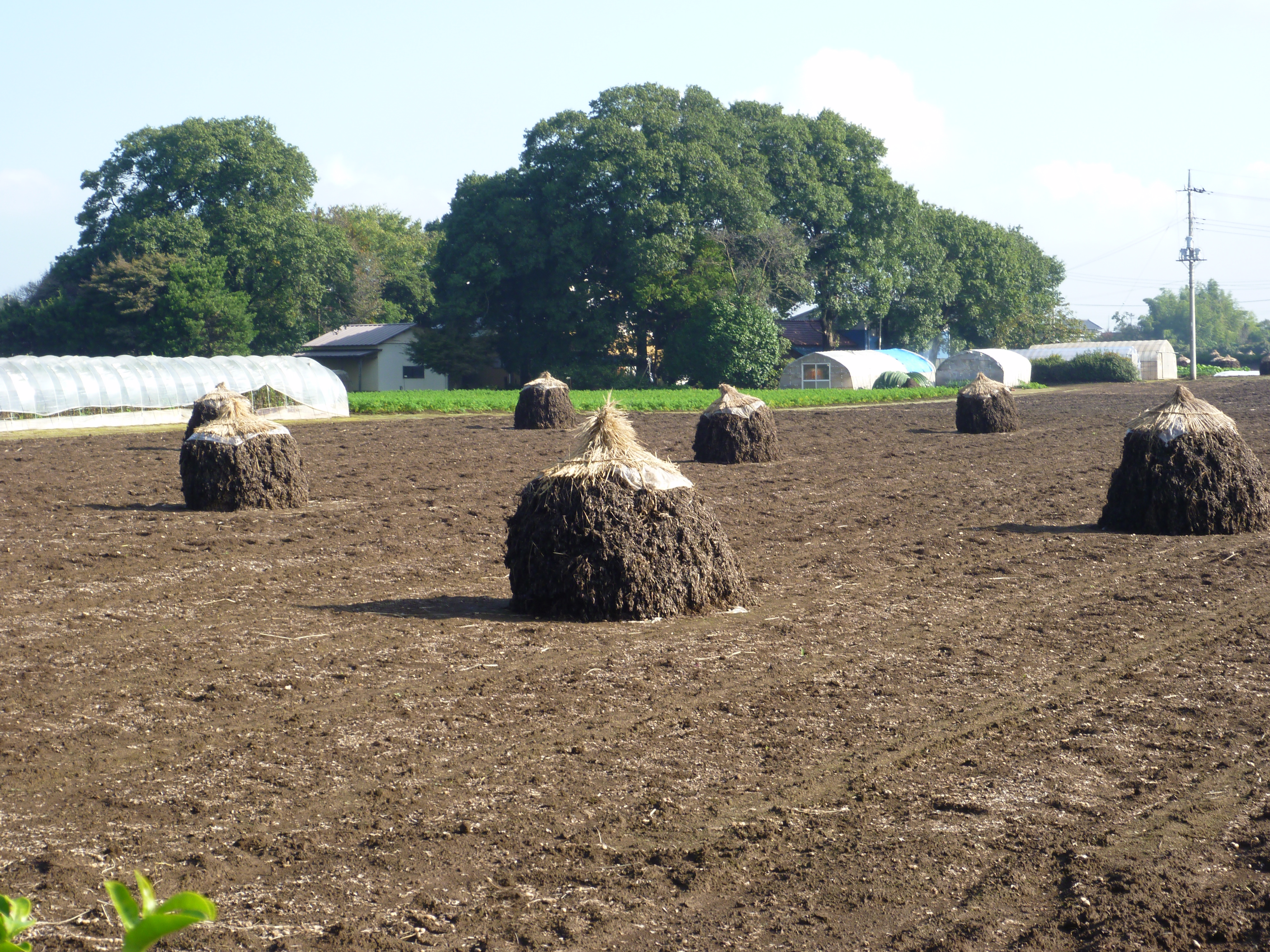 八街の落花ぼっち